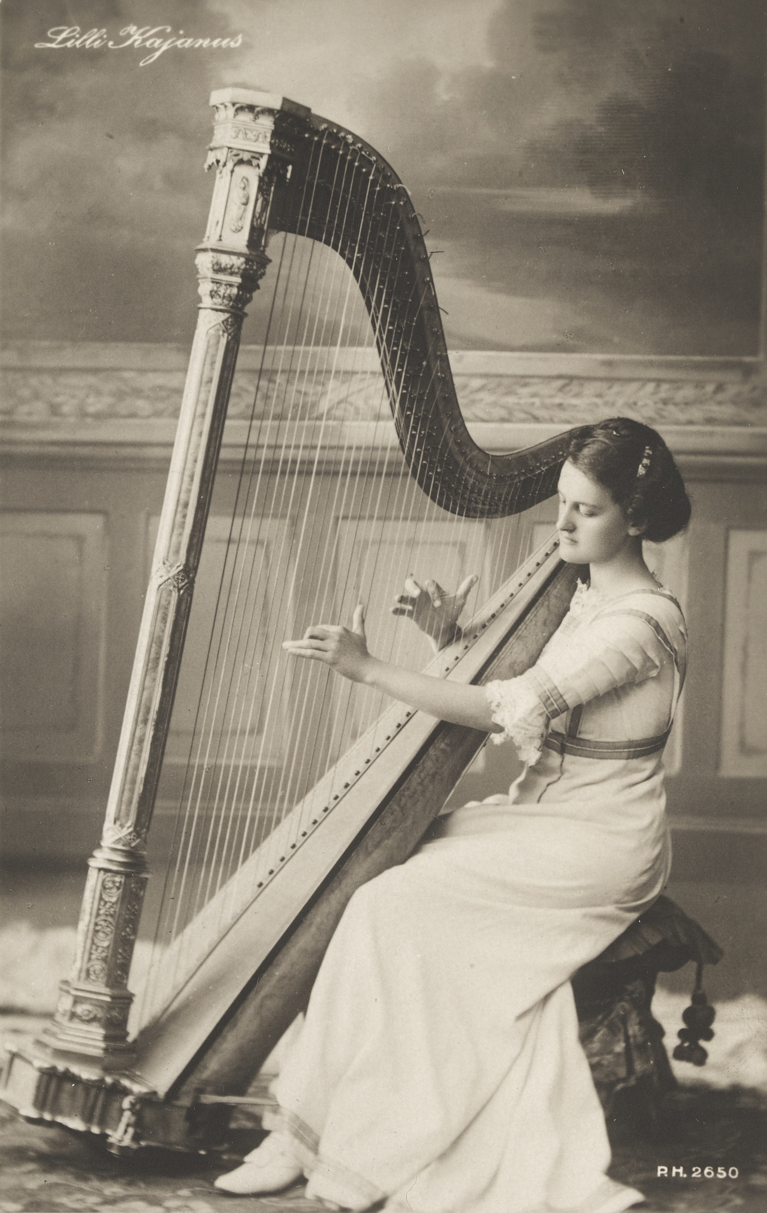 harpputaiteilija Lilly Kajanus; pysty, mustavalkoinen